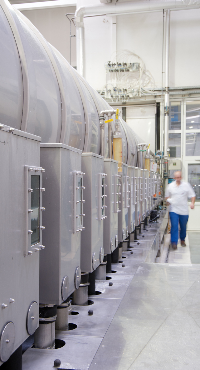 Waschstraße im Betrieb Wiener Neustadt des Unternehmens Salesianer Miettex.